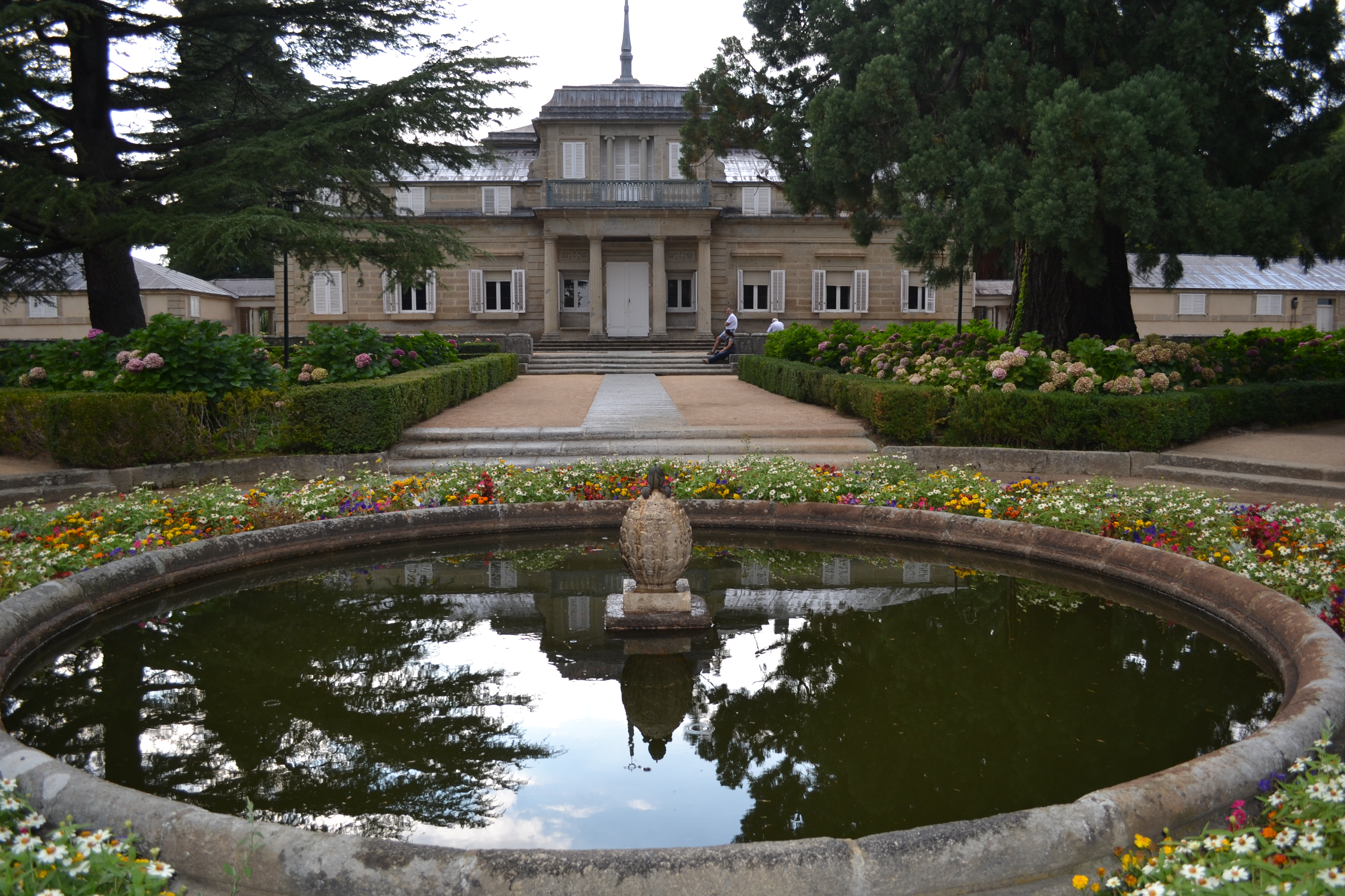 Casita del Príncipe (El Escorial).